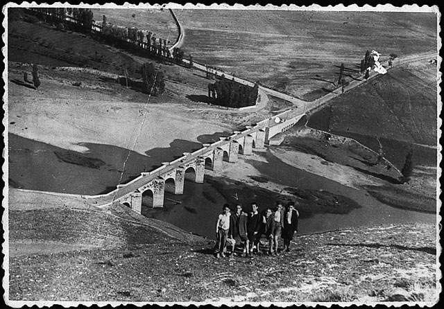 Puente sobre el Pisuerga - Cabezón de Pisuerga (Valladolid) - Fechada en mayo de 1942. Se observa en primer término a unos escolares de excursión, y al fondo el puente románico de Cabezón sobre el Pisuerga. De origen romano, sustituido en la Edad Media por los cimientos del actual y reformado en el siglo XVII, está formado por cuatro ojos de perfil ojival sobre pilares redondos y los otros cinco de medio punto sobre pilares poligonales. - Fotografía. Papel 112 x 69 B/N